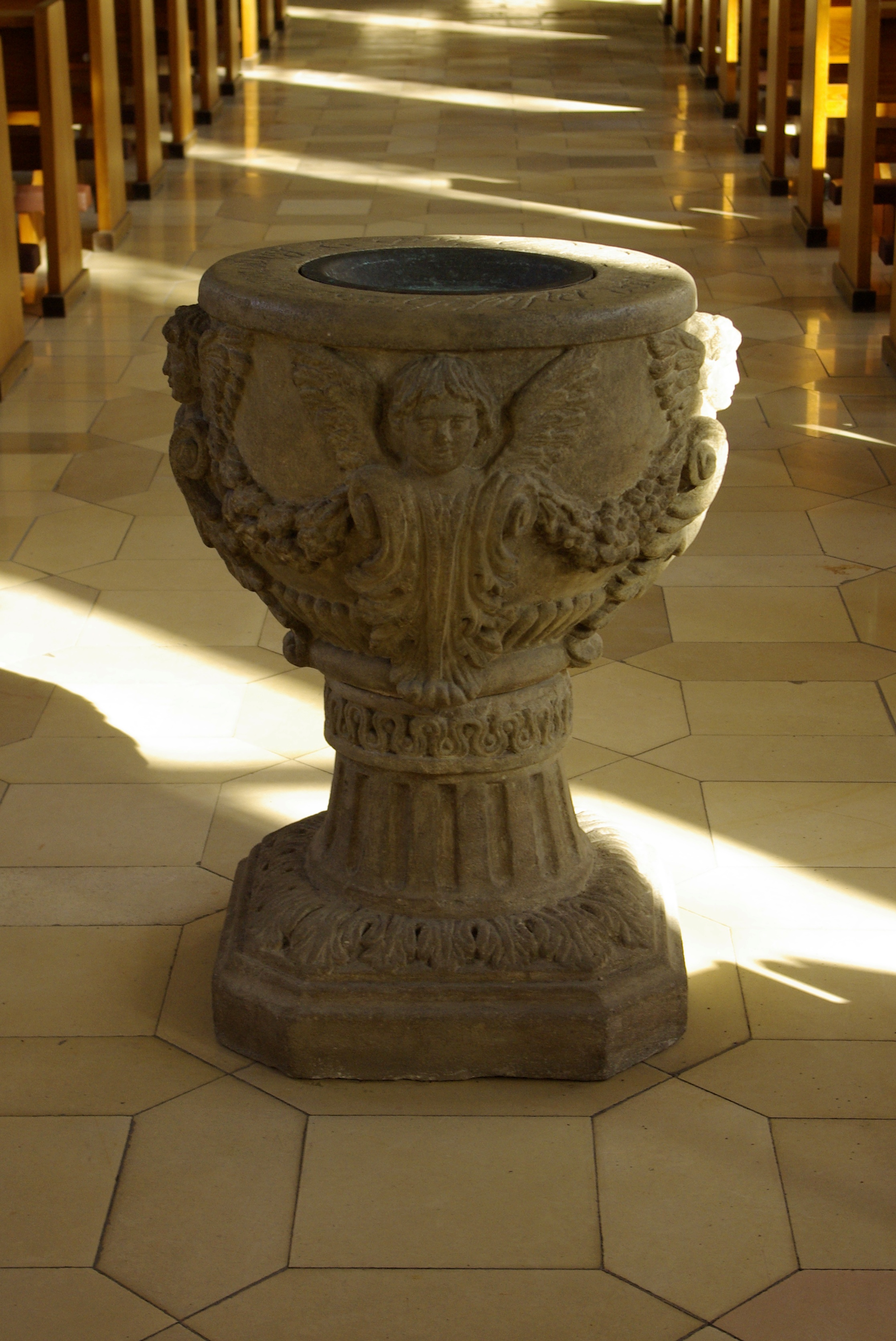 Taufstein von 1830 in der katholischen Kirche Herz Jesu in Erlangen.